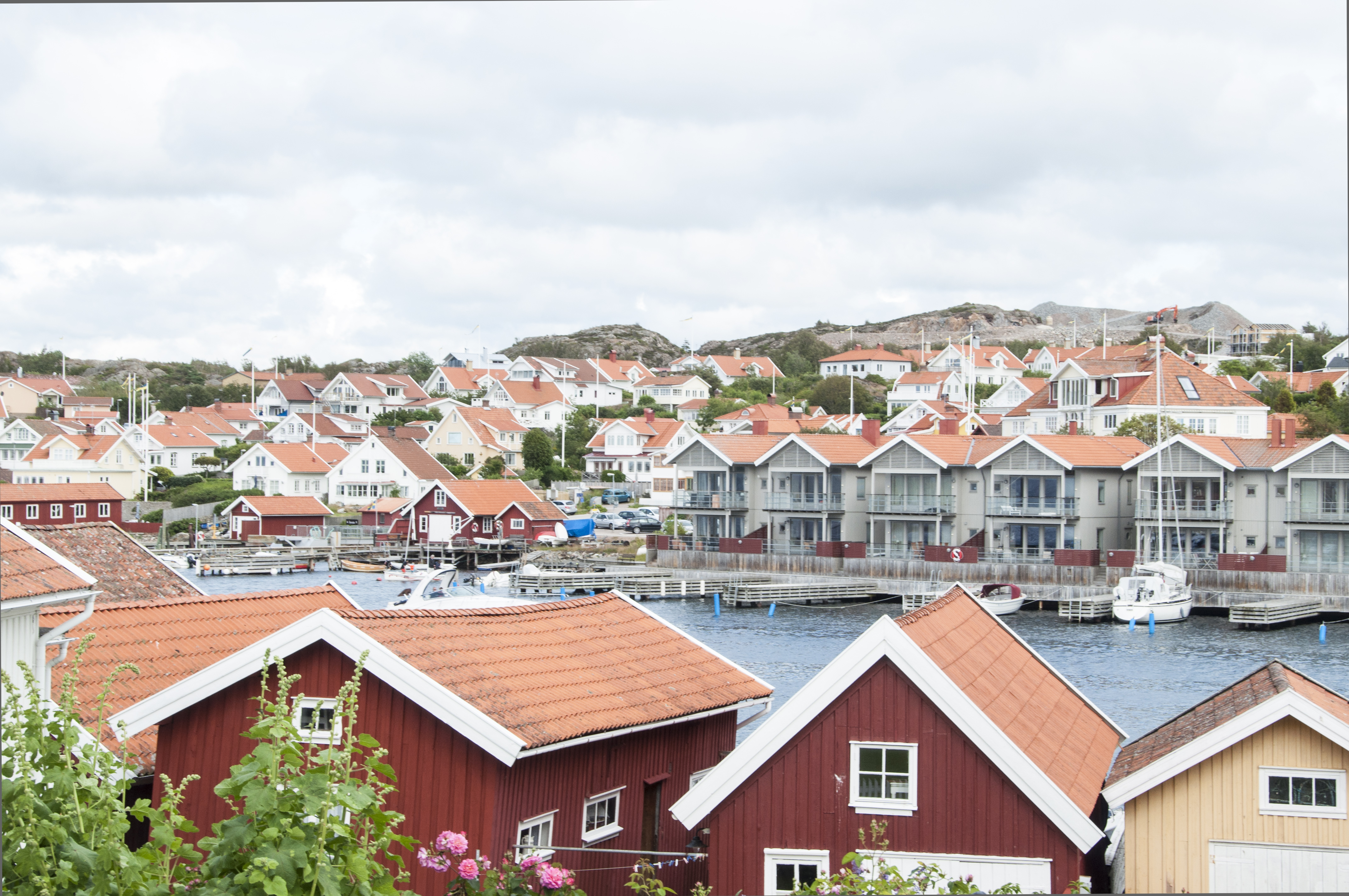 Fiskebäckskil